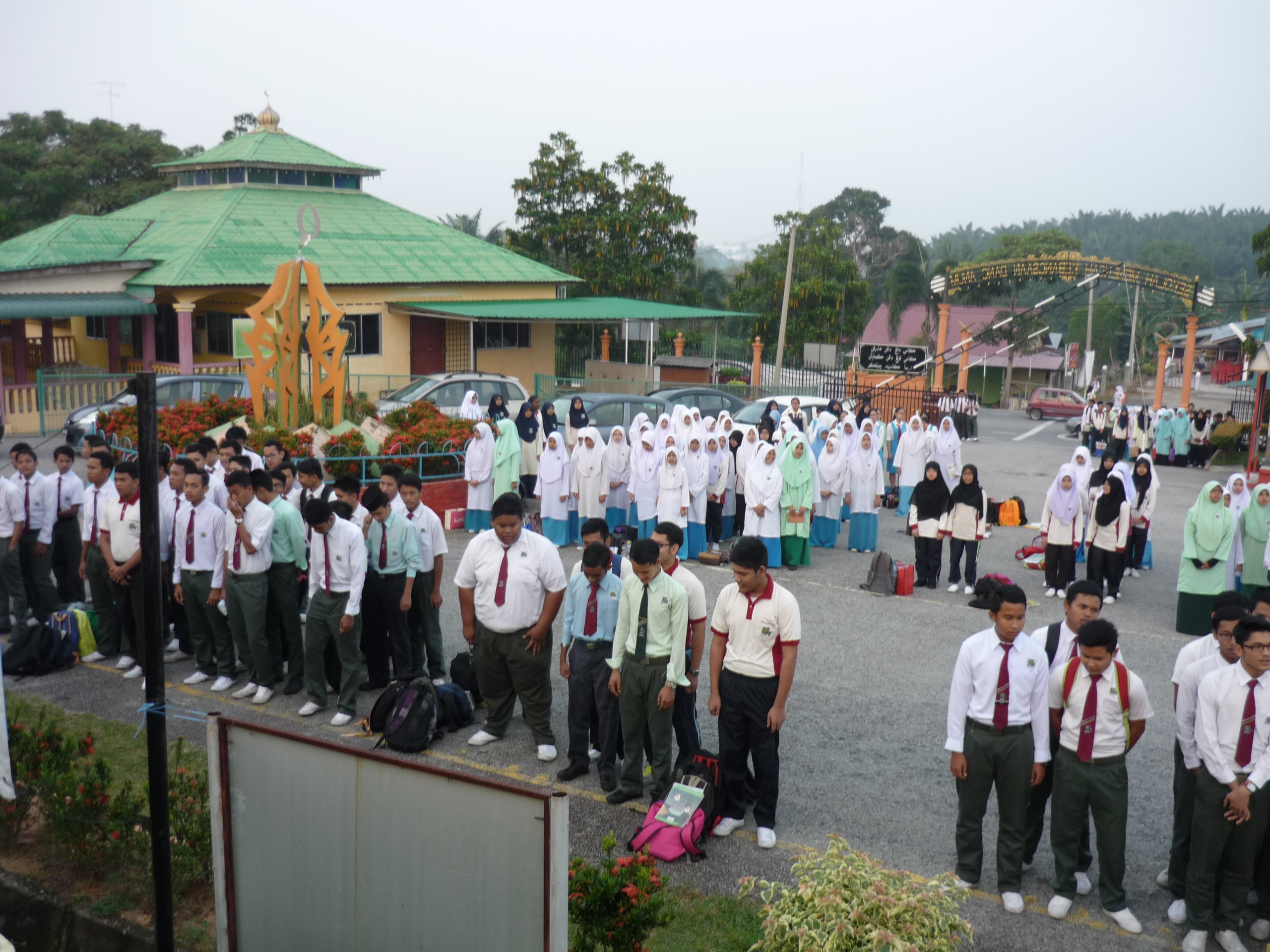 Pelajar sedang berhimpun di Dataran SMKDA